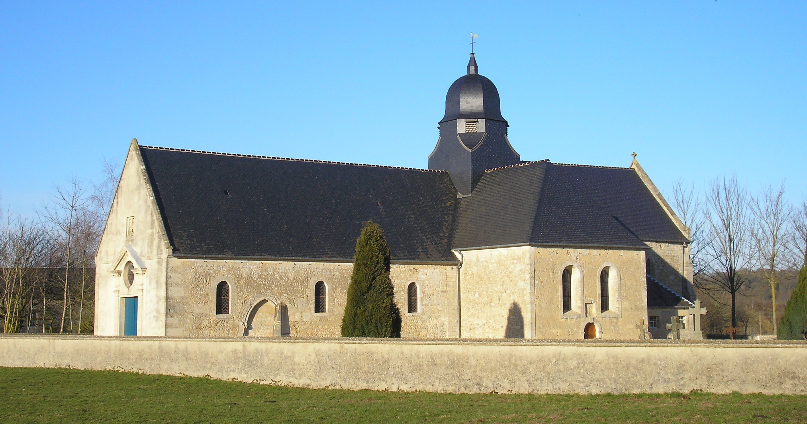 Chouain (Normandie, France). L'église Saint-Martin.